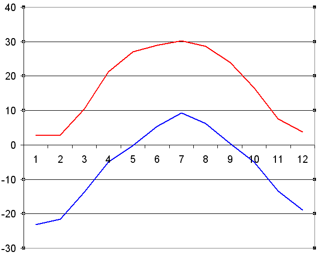 Максимальная и минимальная температура за месяц в Москве